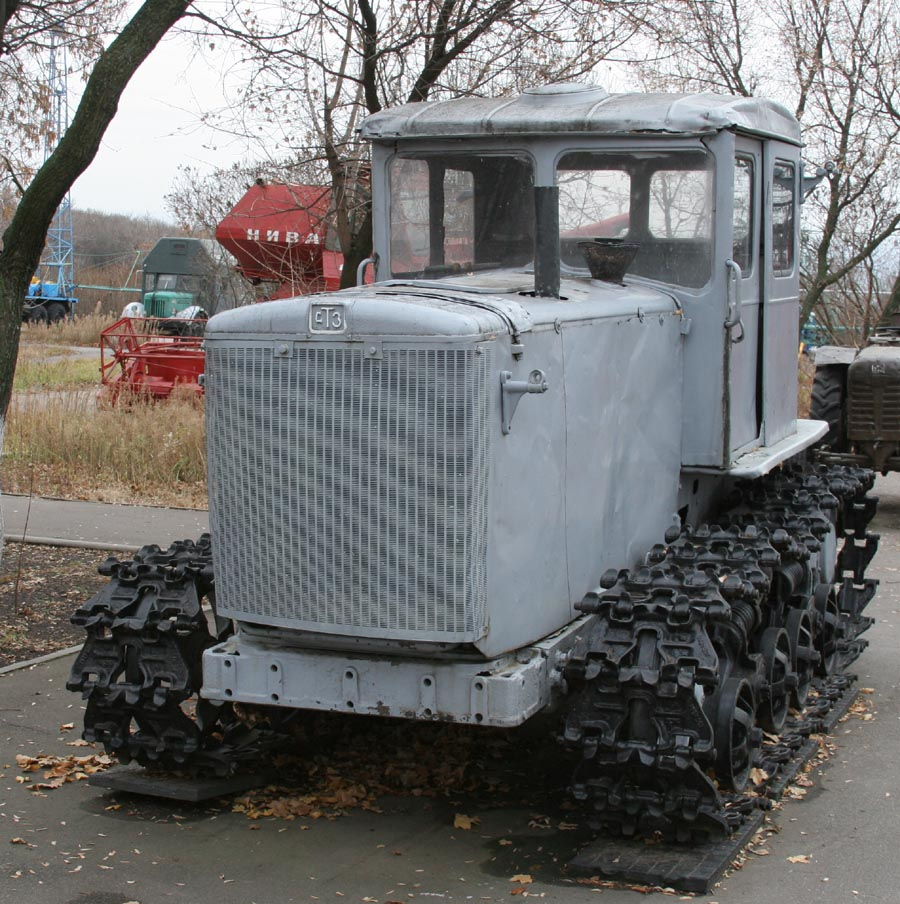 Трактор ДТ-54 в Саратове на Соколовой горе